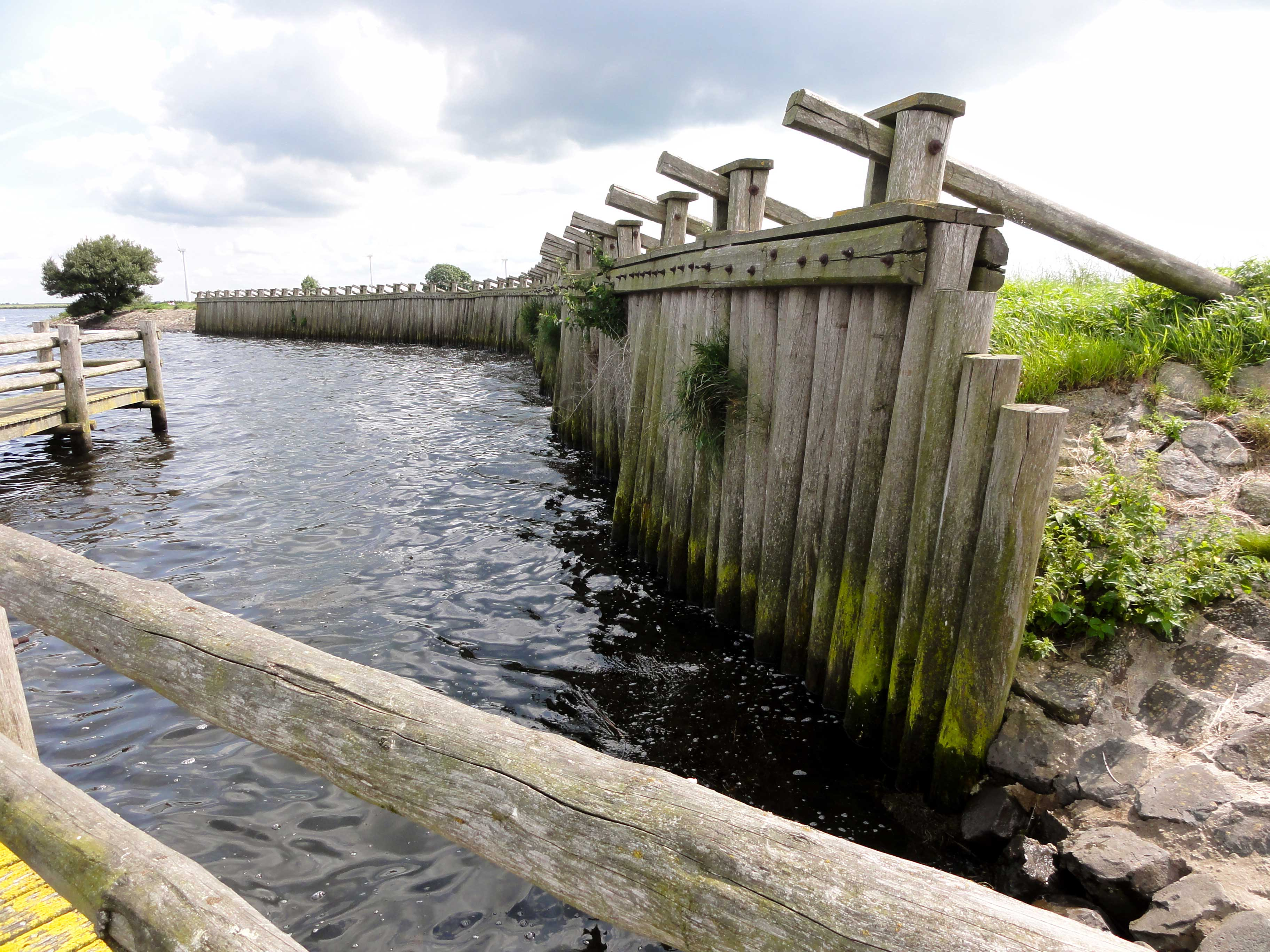 Reconstructie van een palendijk (vroeger gebruikt in de Zuiderzee) bij het Eemmeer tussen Spakenburg en Eemdijk